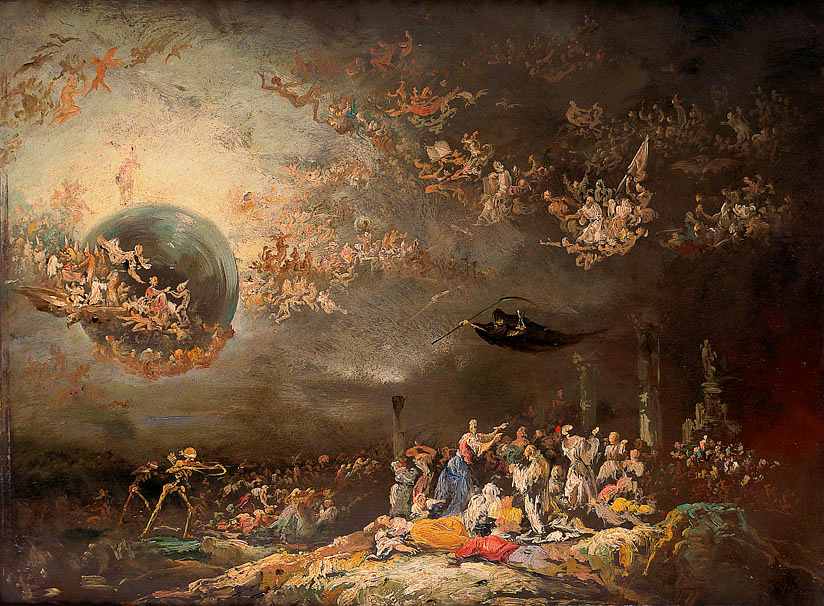 Visión alegórico-satírica del Juicio Final. Óleo sobre lienzo, 59 x 68 cm